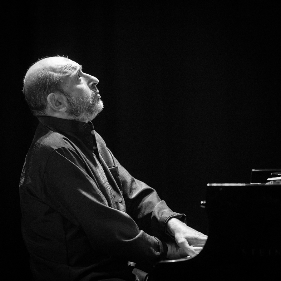 Misha Alperin (7 November 1956 — 11 May 2018) — Soviet-Norwegian jazz pianist, composer, band-leader, known as a key member of the Moscow Art Trio. Михаи́л Ефи́мович Альпе́рин (Миша Альперин, Misha Alperin; 7 ноября 1956, Каменец-Подольский, Украинская ССР — 11 мая 2018, Осло, Норвегия) — советский, молдавский, российский и норвежский джазовый пианист, композитор, бэнд-лидер, ключевой участник Moscow Art Trio.